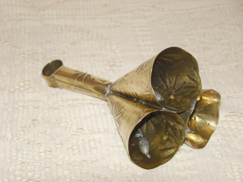 Adjá usado no candomblé